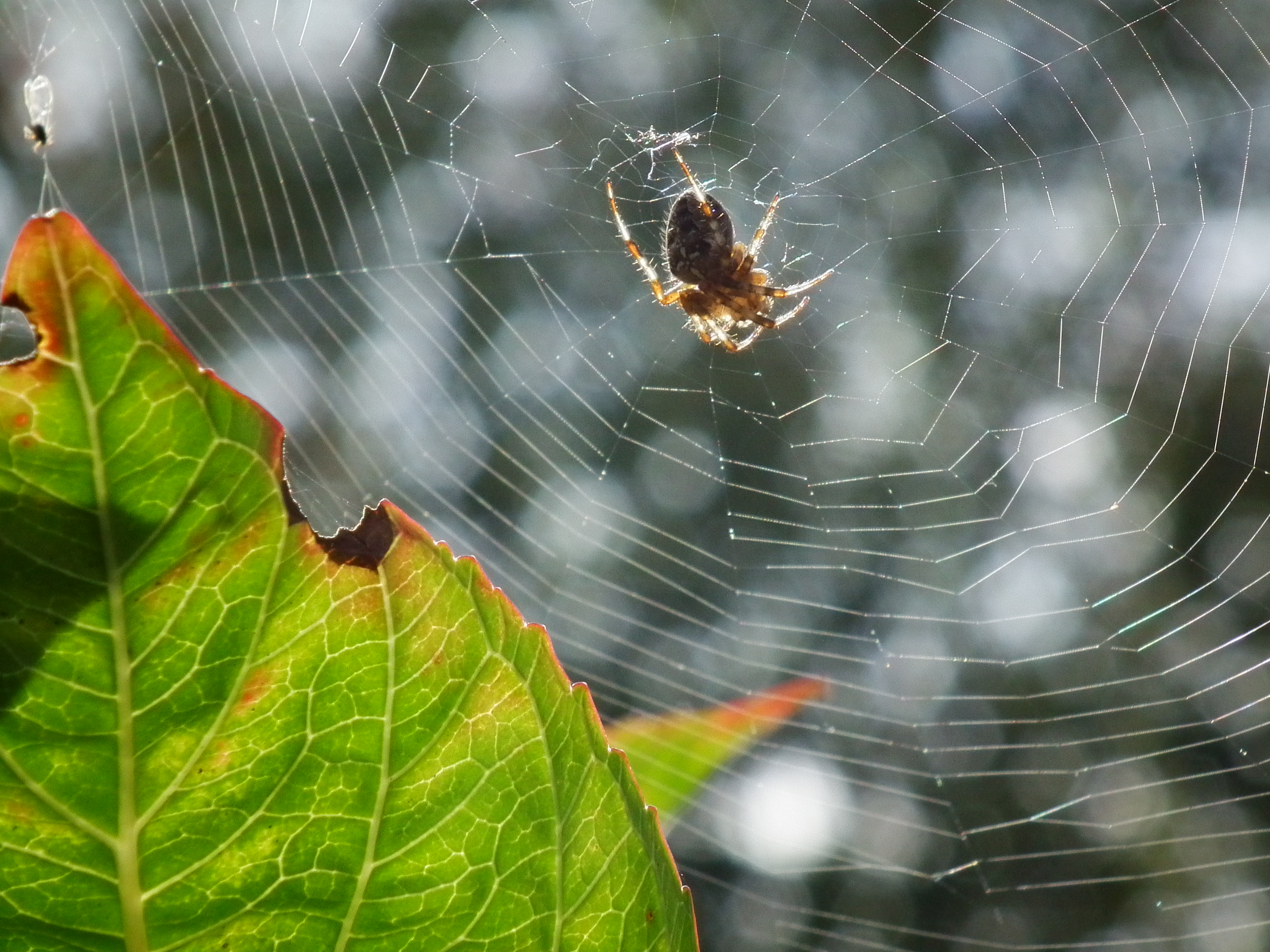 Gartenkreuzspinne (Araneus diadematus) in ihrem Netz, fotografiert in Greetsiel (Niedersachsen, Deutschland)